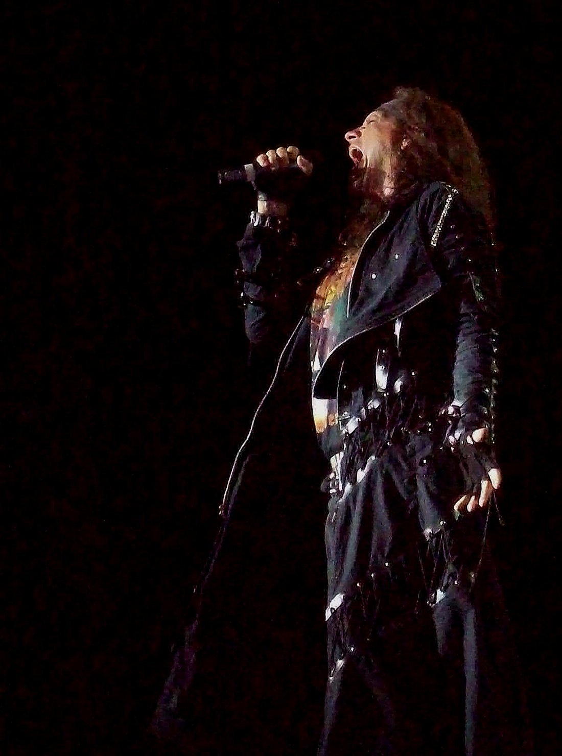 Barquisimetal. Gillmanfest 2011. Barquisimeto, estado Lara. República Bolivariana de Venezuela. Con el Apoyo del Ministerio de la Cultura y la Alcaldía Socialista de Iribarren. La foto fue tomada con una cámara KODAK Easyshare de 7MPx. luego retocada en GIMP.